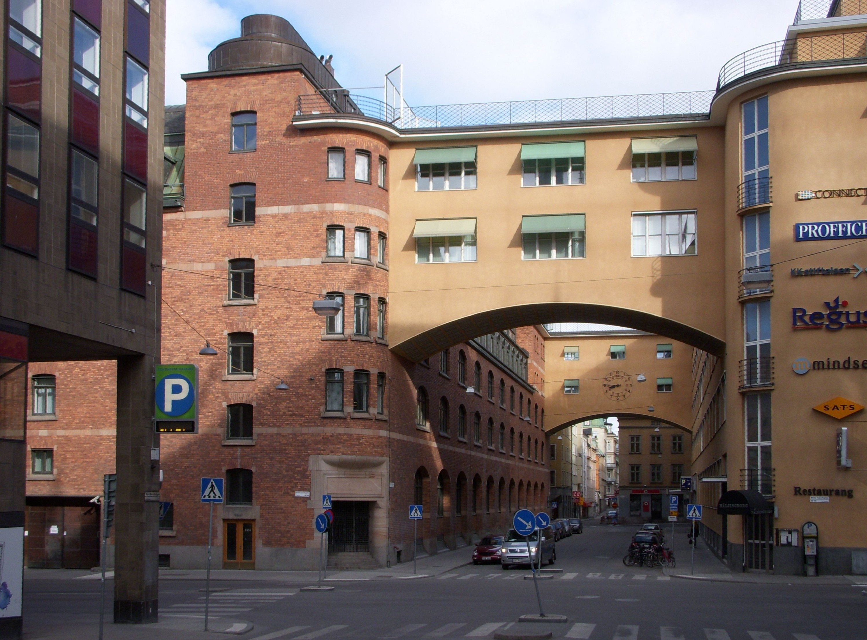 Klara Norra Kyrkogatan i Stockholm